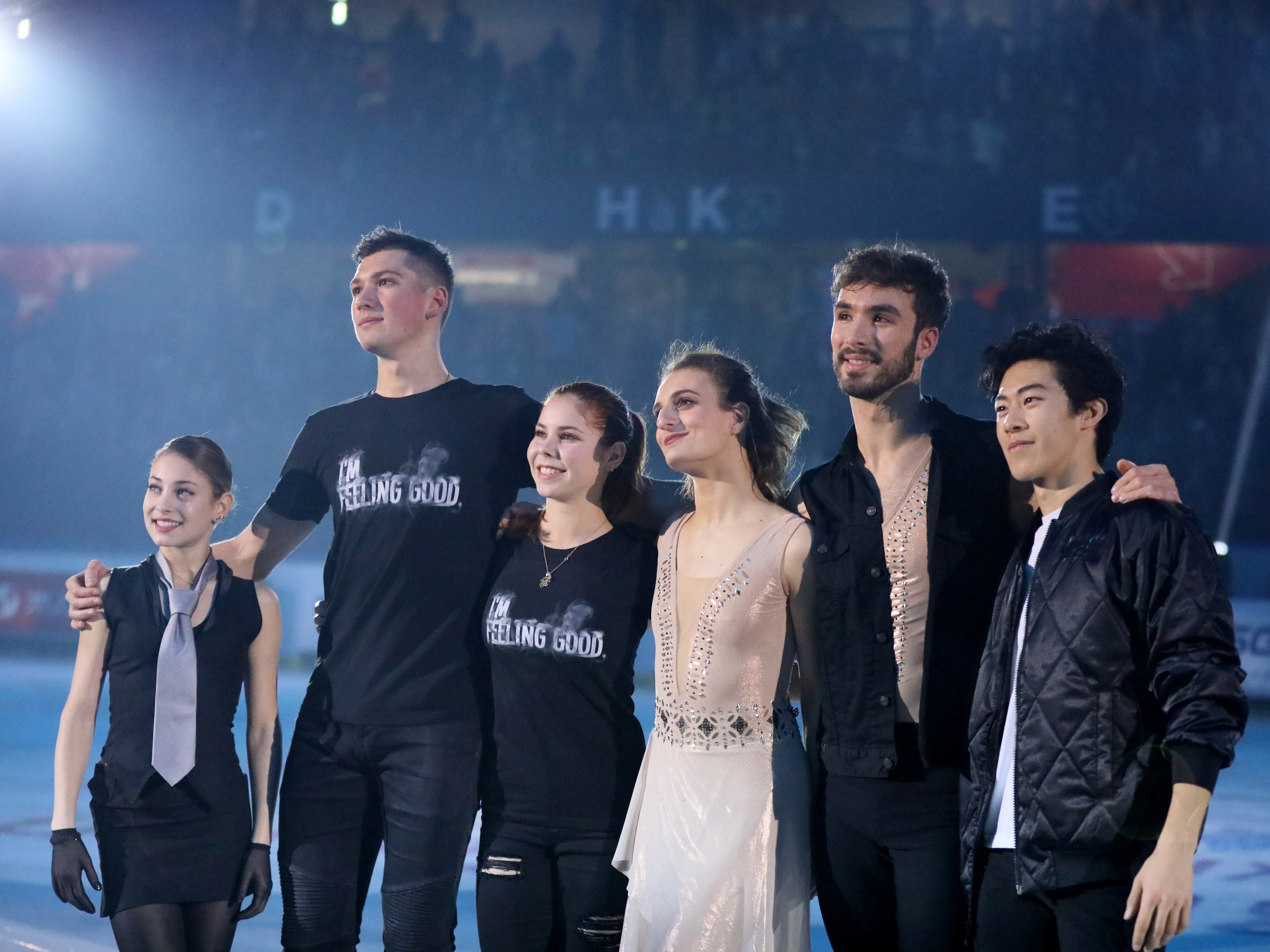 Gala des Internationaux de France 2019